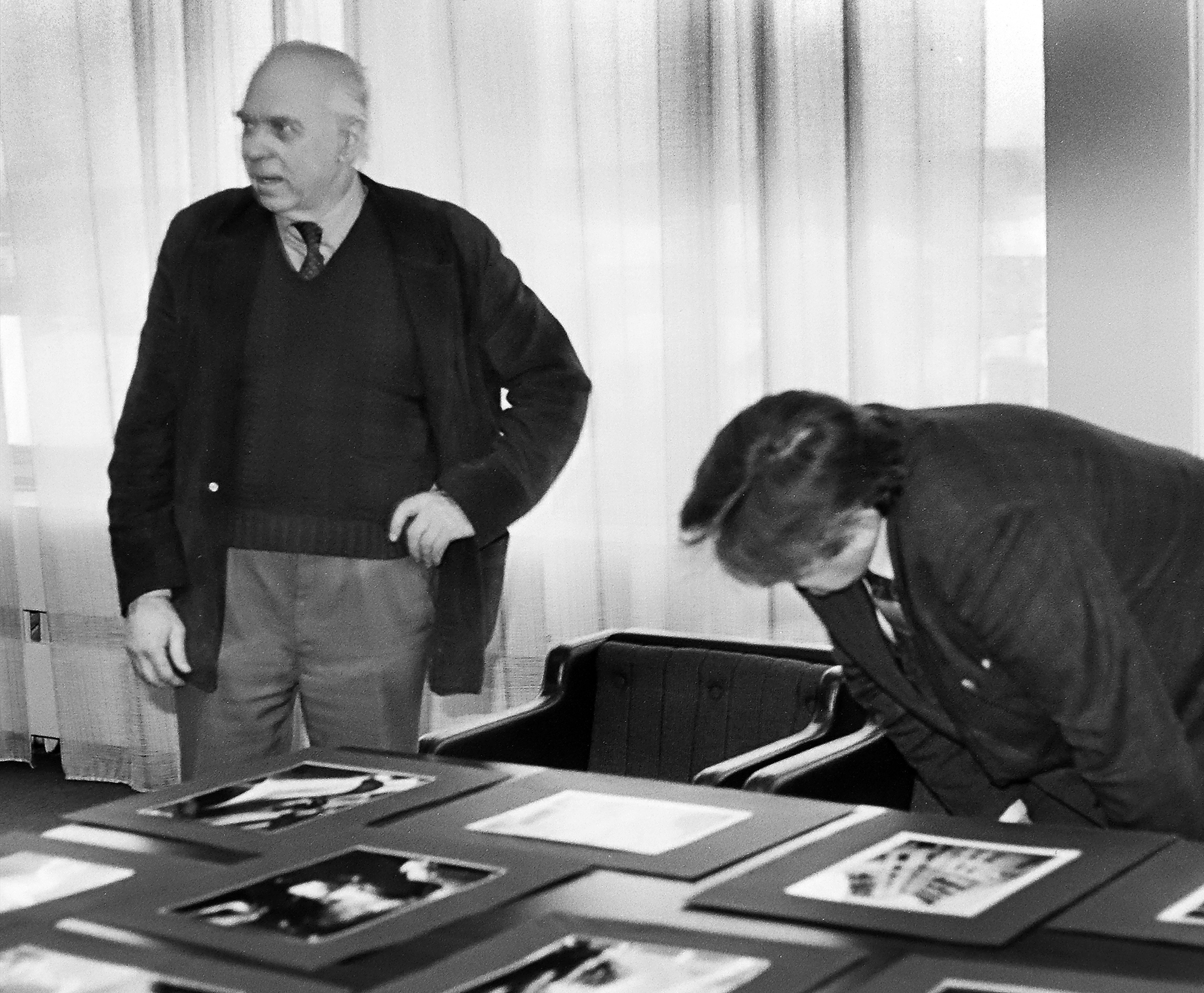 Armult Reinsalu, fotograaf ja matkasportlane 86